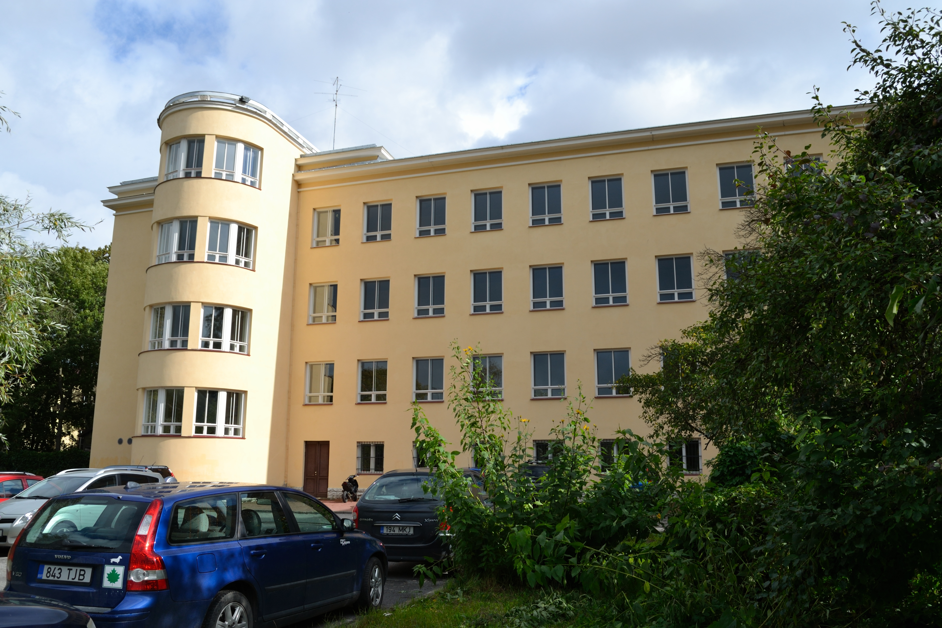 Tallinn, koolihoone Kevade 8, 1940